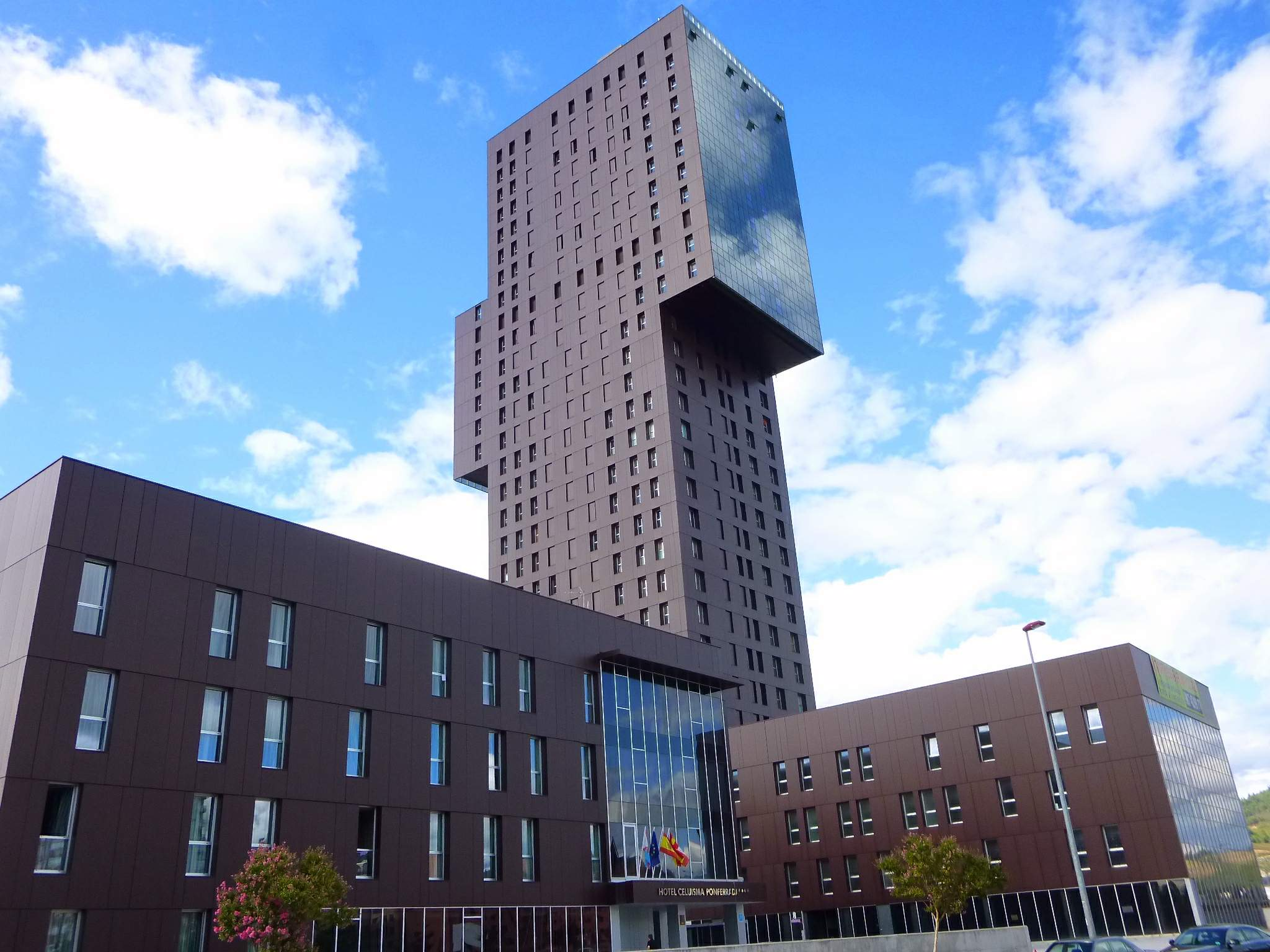 Torre de la Rosaleda (Ponferrada)